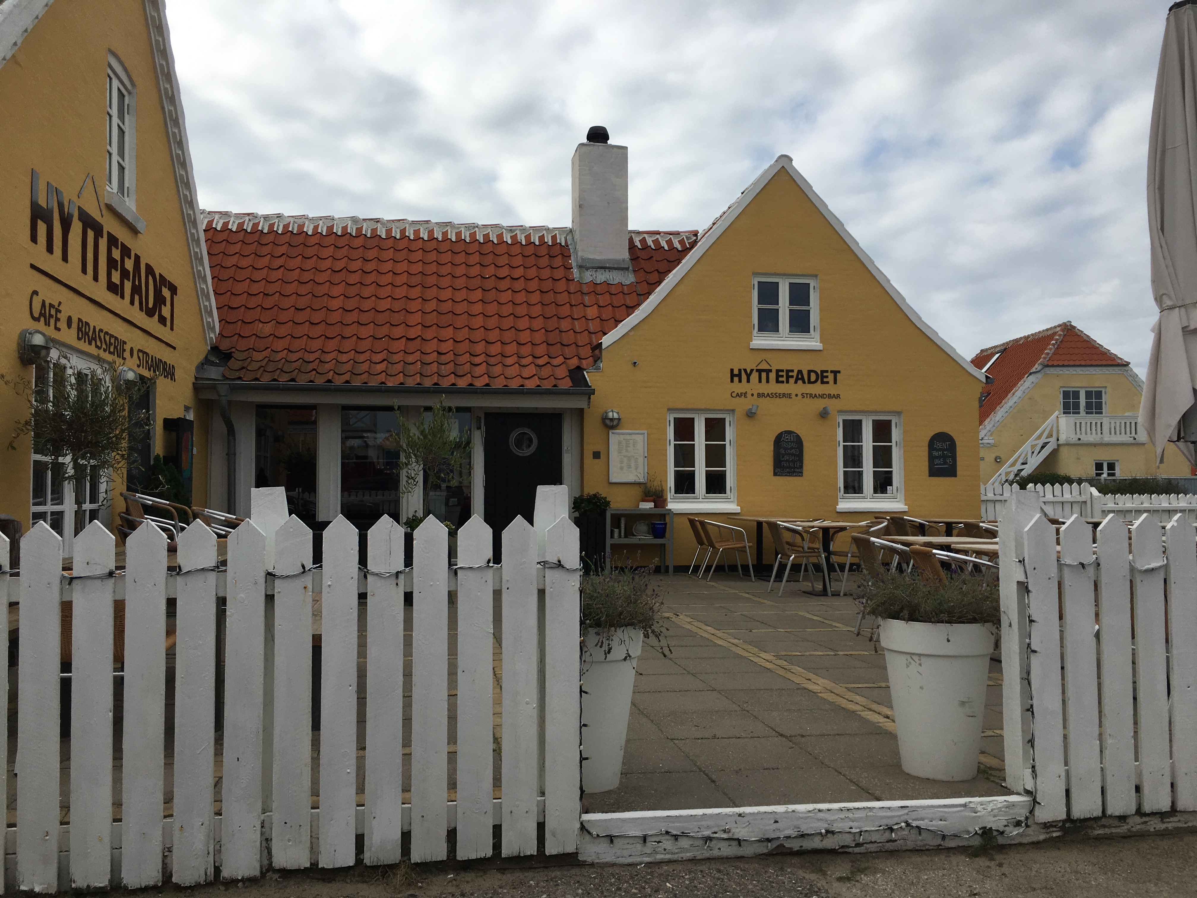 Restuarant i Gl. Skagen